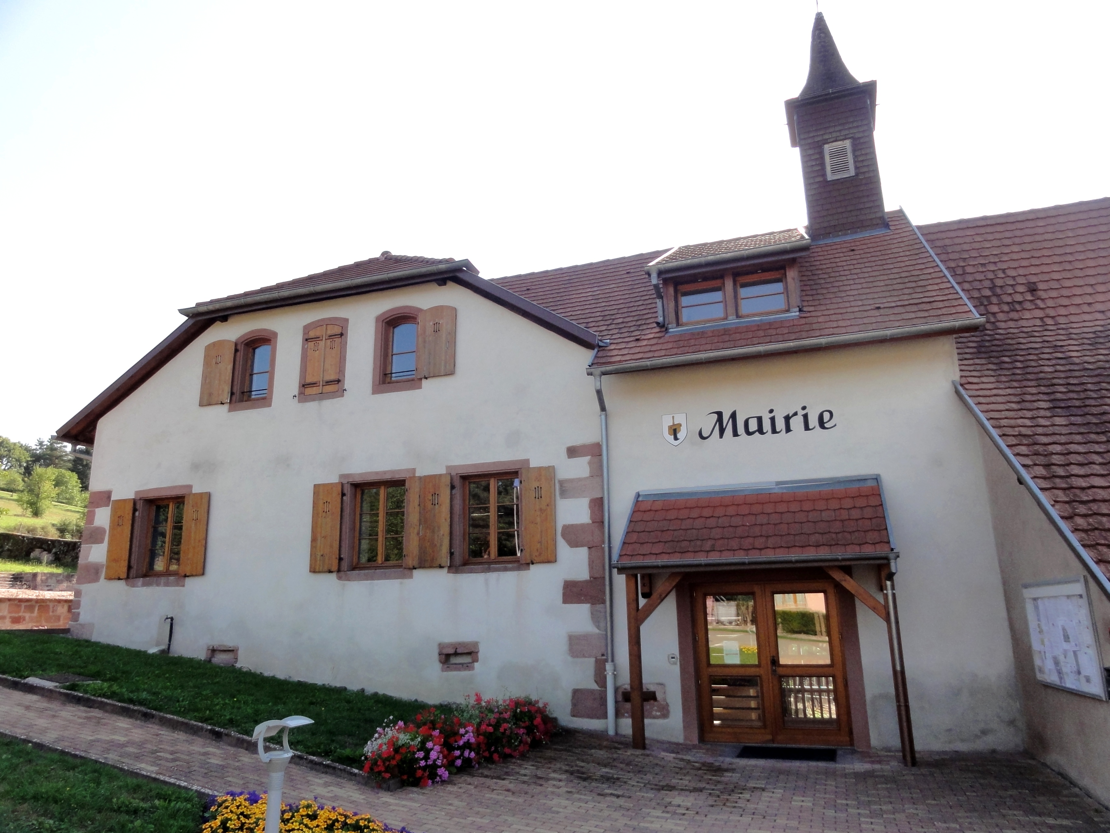 Alsace, Bas-Rhin, Saint-Pierre-Bois, Ancien presbytère (XVIIIe-XIXe), actuellement mairie, 50 rue Principale. .